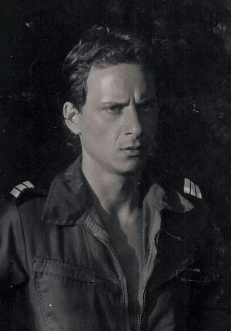 רפי אדיר בתפקיד יוני קצין המודיעין בסרטו של שמעון דותן "חיוך הגדי"